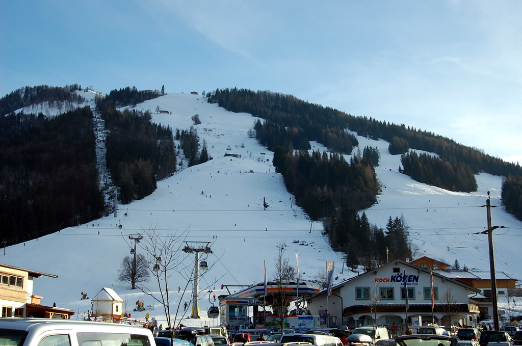 Unterberghorn in Kössen, Österreich